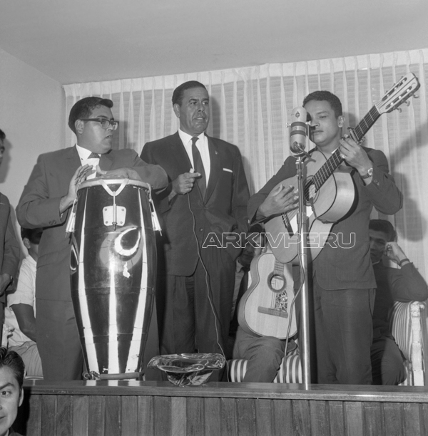 Augusto Ferrando y Melcochita en la Peña Ferrando en abril 1966. Esta fotografía proviene de la Peña Ferrando, una organización ya extinta.